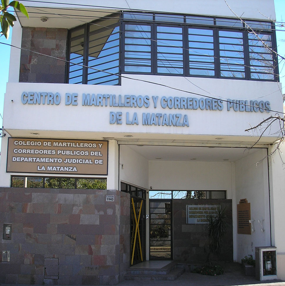 Frente del Centro de Martilleros y Corredores Públicos de La Matanza.